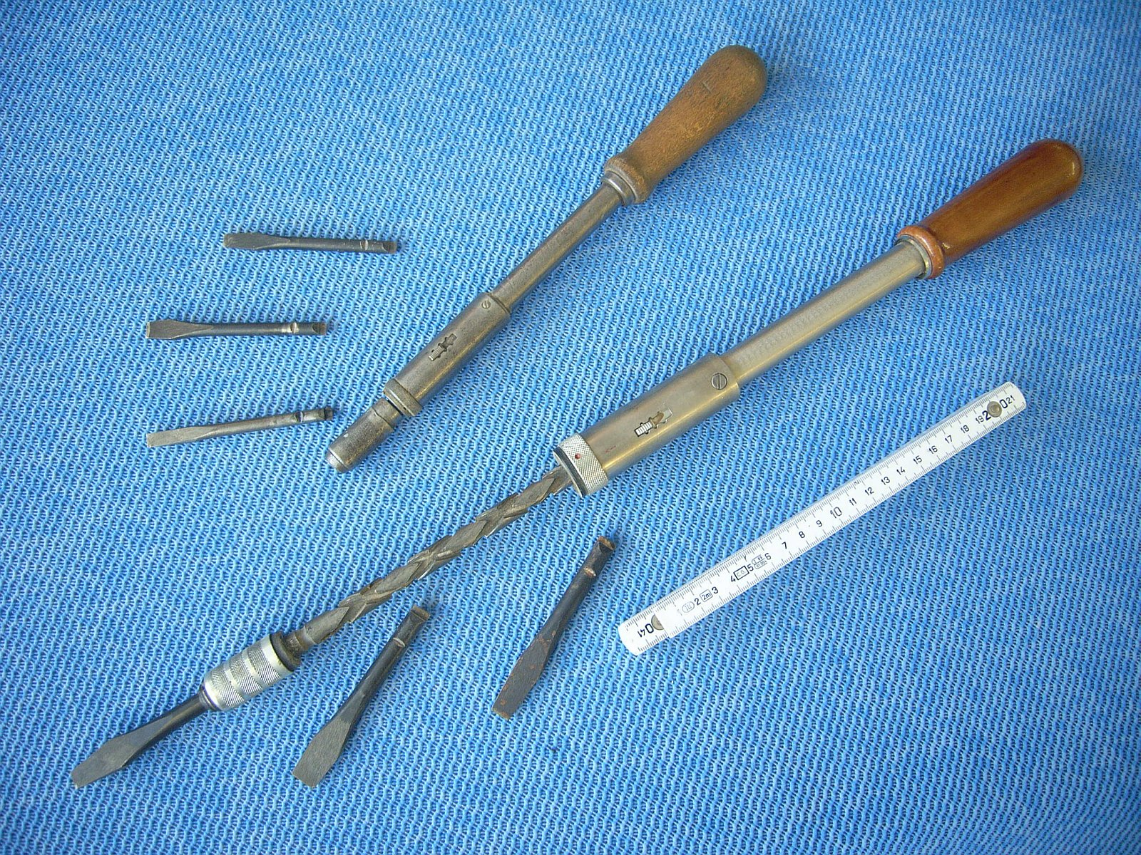 Drillschraubendreher,Drillschraubenzieher